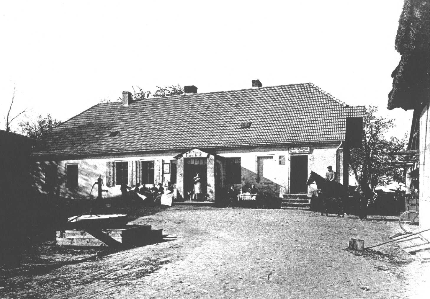 budynek gospody w Trzebieszewie - obecnie najprawdopodobniej posesja pp. Burlikowskich